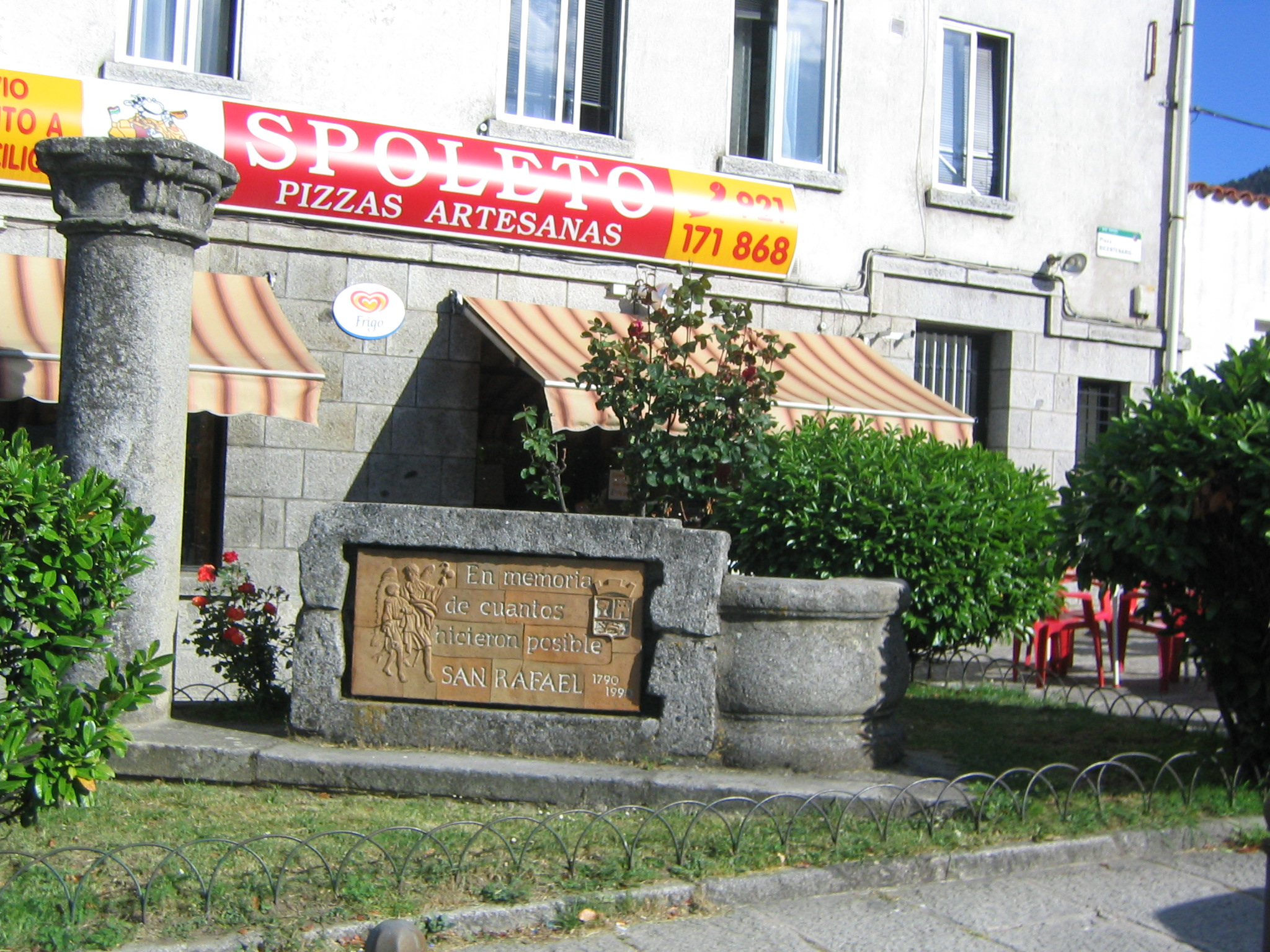 El Espinar, Segovia España. Monumento a los pioneros de San Rafael.